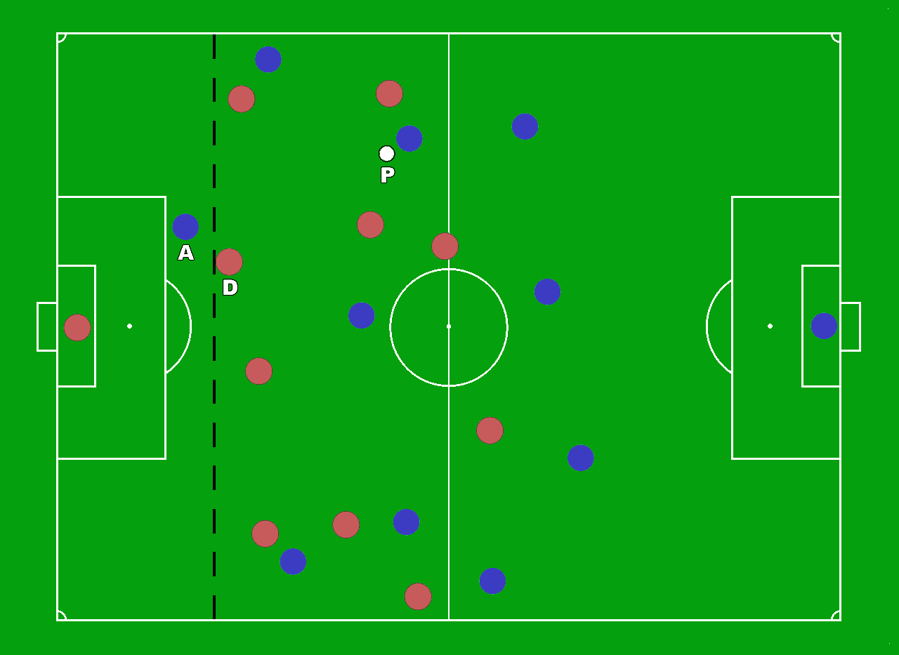 Esempio di posizione di fuorigioco. Il calciatore attaccante (A) è in fuorigioco in quanto più vicino alla linea di porta avversaria (a sinistra) sia rispetto al pallone (P), sia al penultimo calciatore difendente avversario (D) la cui posizione rispetto alla linea di porta è evidenziata ulteriormente dalla linea tratteggiata.